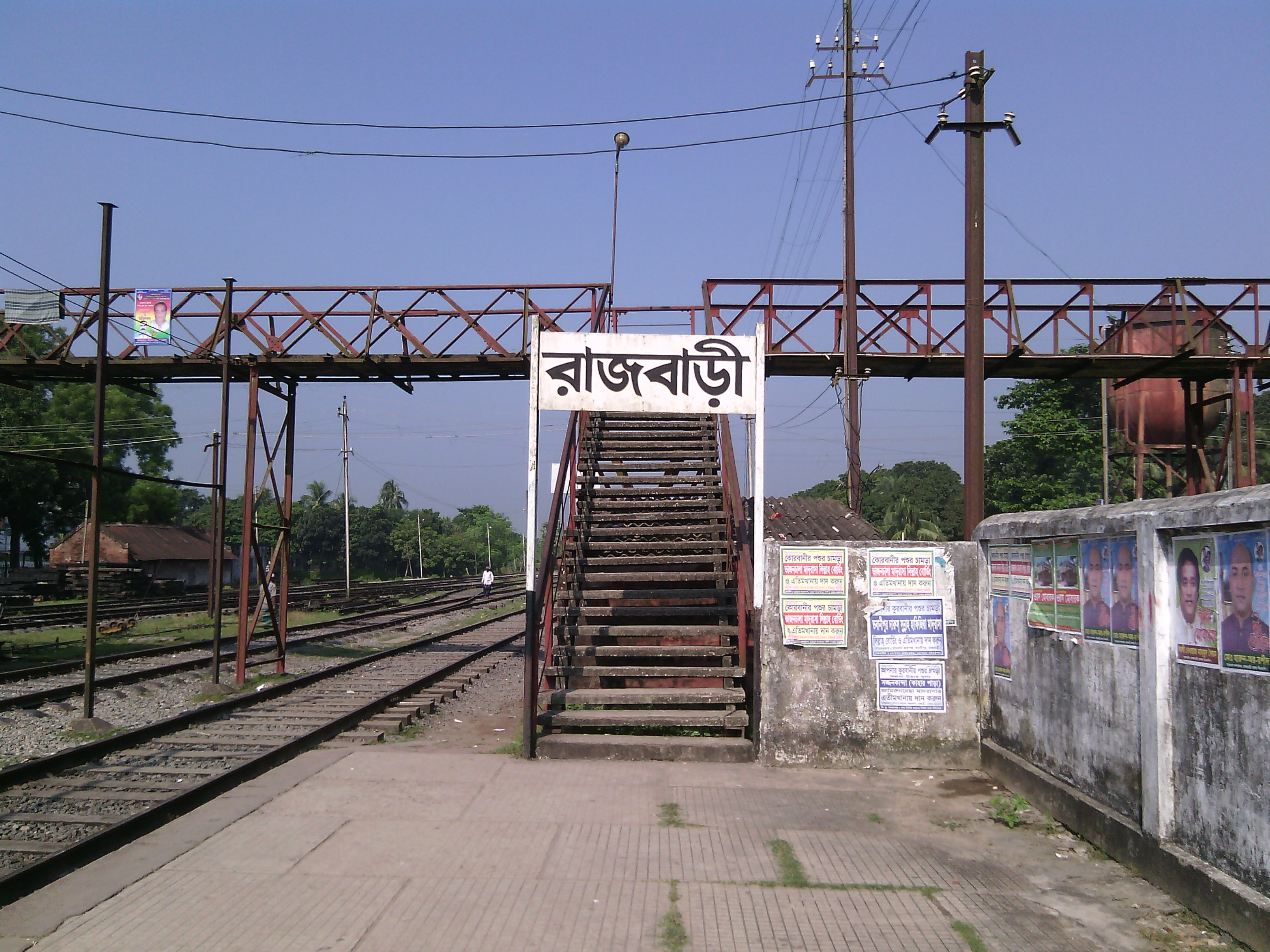 রেলকে কেন্দ্র করেই রাজবাড়ী শহরের প্রসার ও উৎকর্ষসাধন ঘটে।